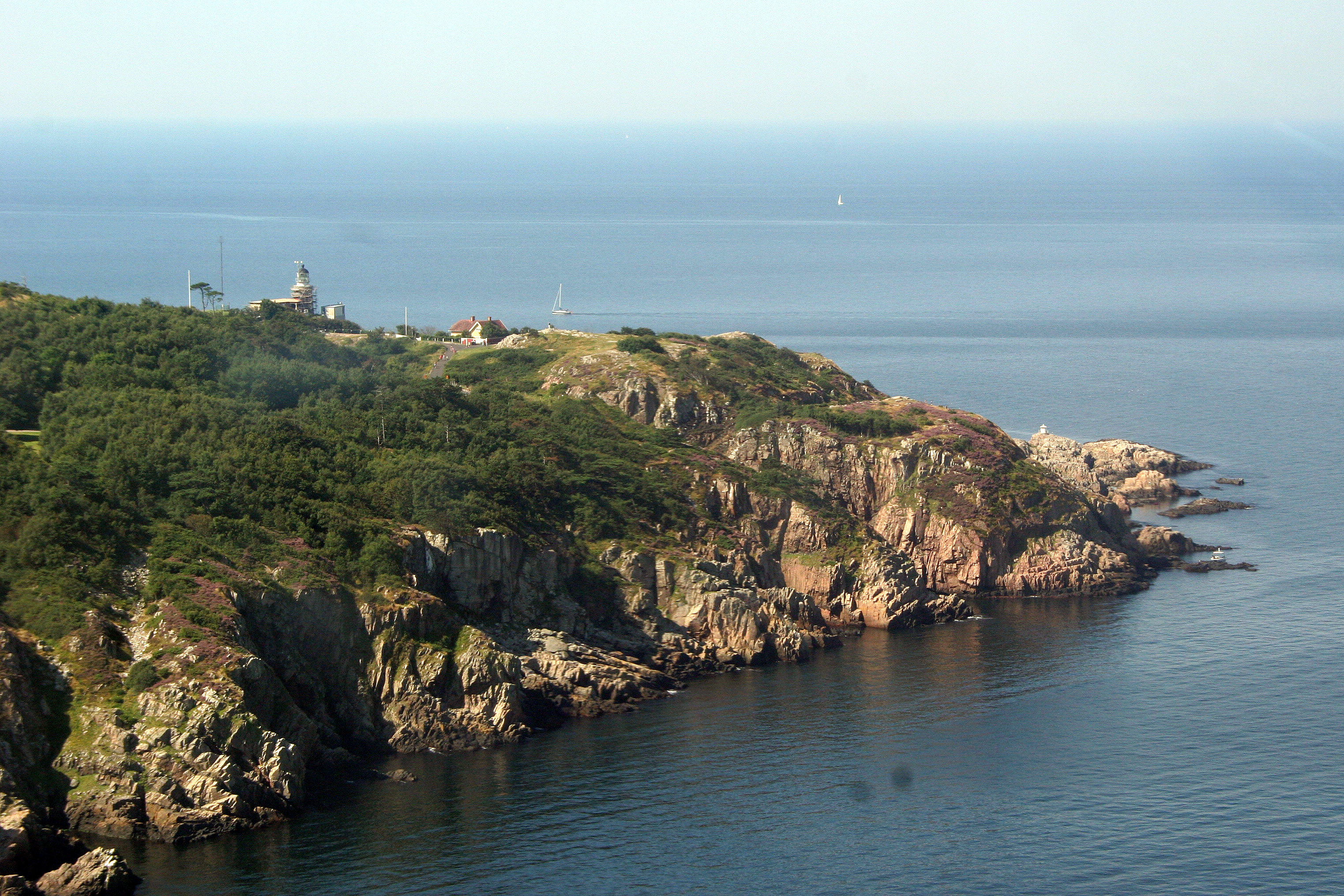 Kullaberg